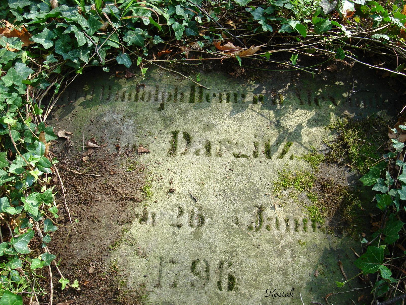 Wandajny - cmentarz ewangelicki, nagrobek Rudolfa Dargitza